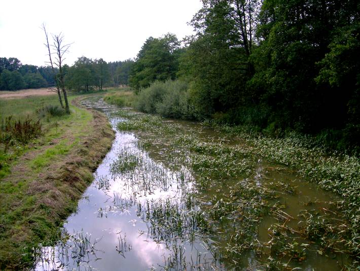 Der Oberlauf der Hamme (Giehler Bach) als Wiesenfluss im Springmoor in der Samtgemeinde Hambergen